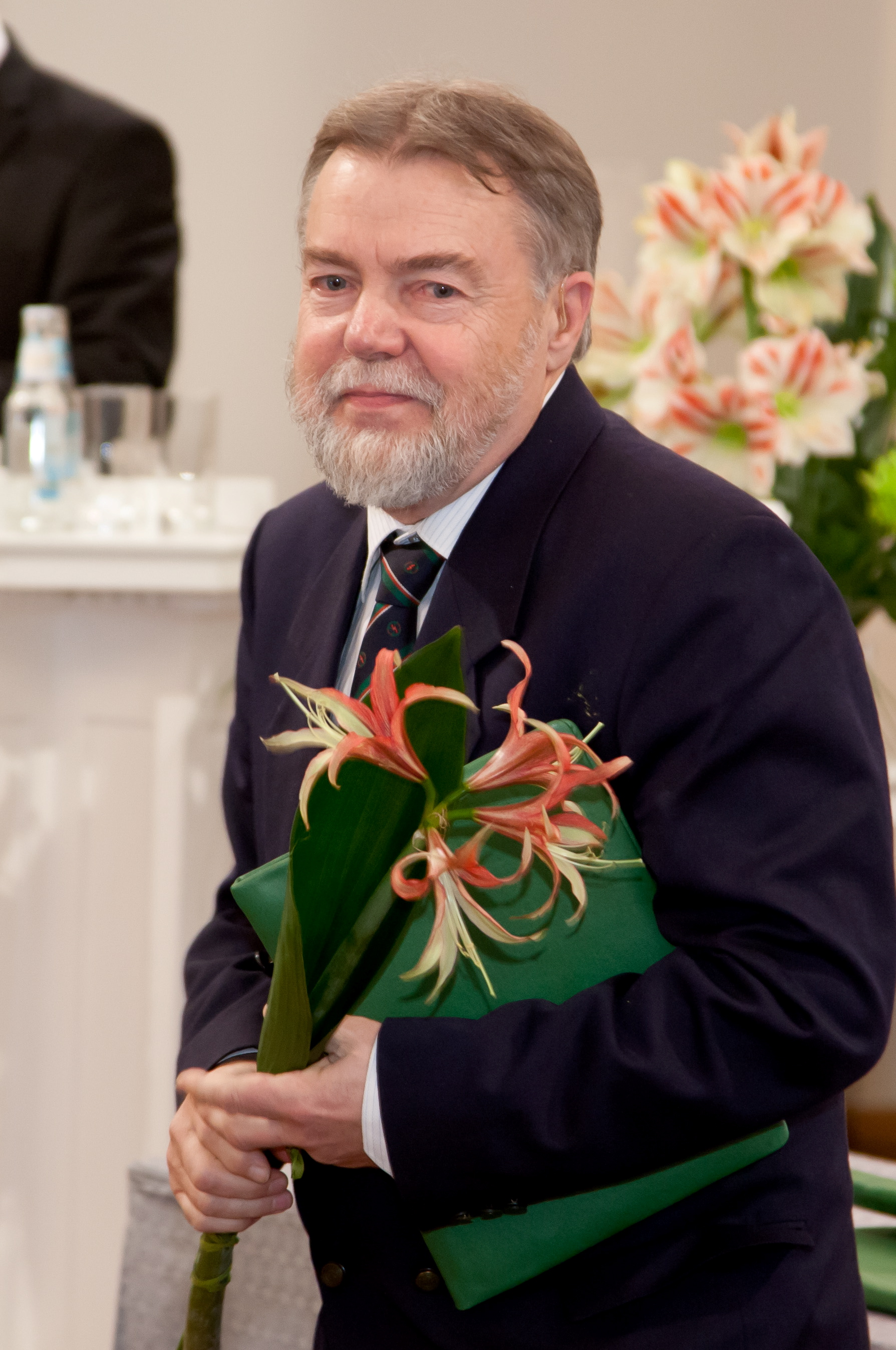 10. novembril 2011 toimus TÜ aulas maailma kultuurinõukogu (World Cultural Council – WCC) auhinnatseremoonia, kus anti üle iga-aastased teaduse ja kunstide auhinnad. Pildil on maailma kultuurinõukogu audiplomi pälvinud professor Jüri Talvet.